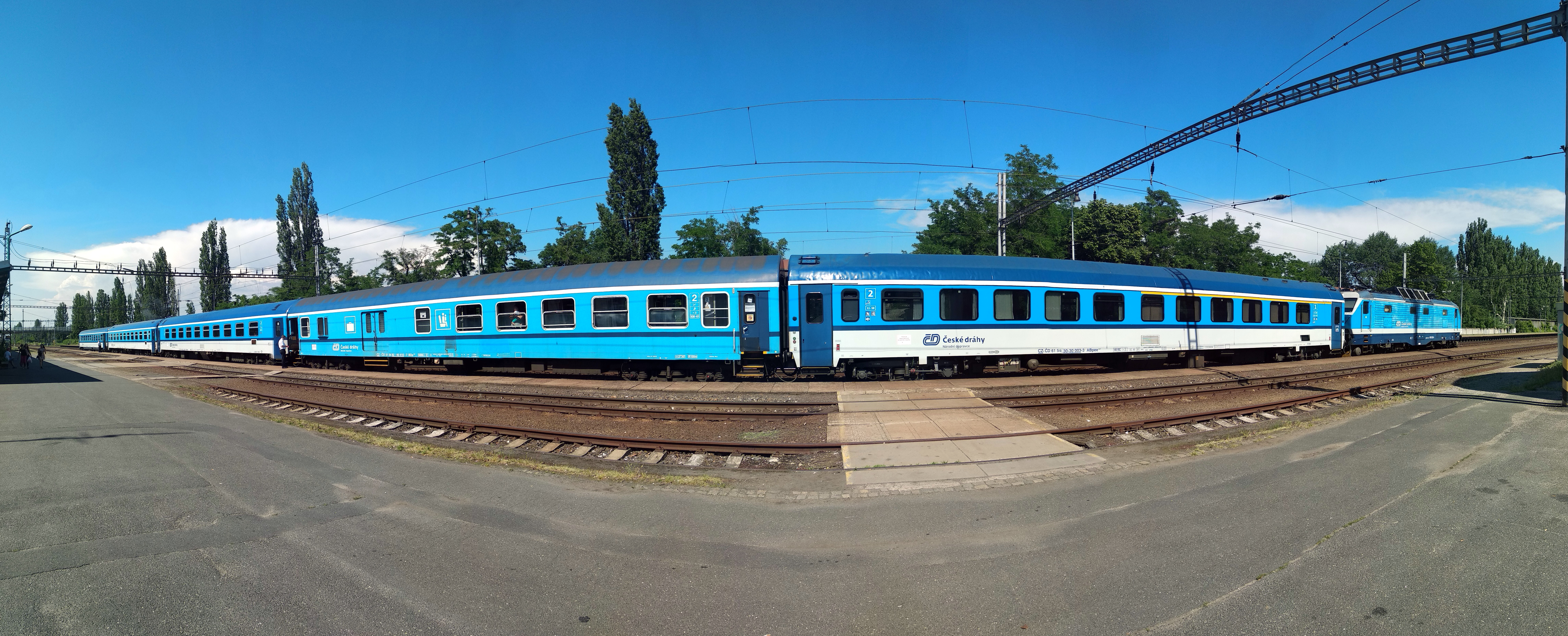 Rychlík ČD 929 Hradečan z Prahy do Trutnova na lince R10 při pobytu ve stanici Poděbrady před pravidelným odjezdem v 15:02.